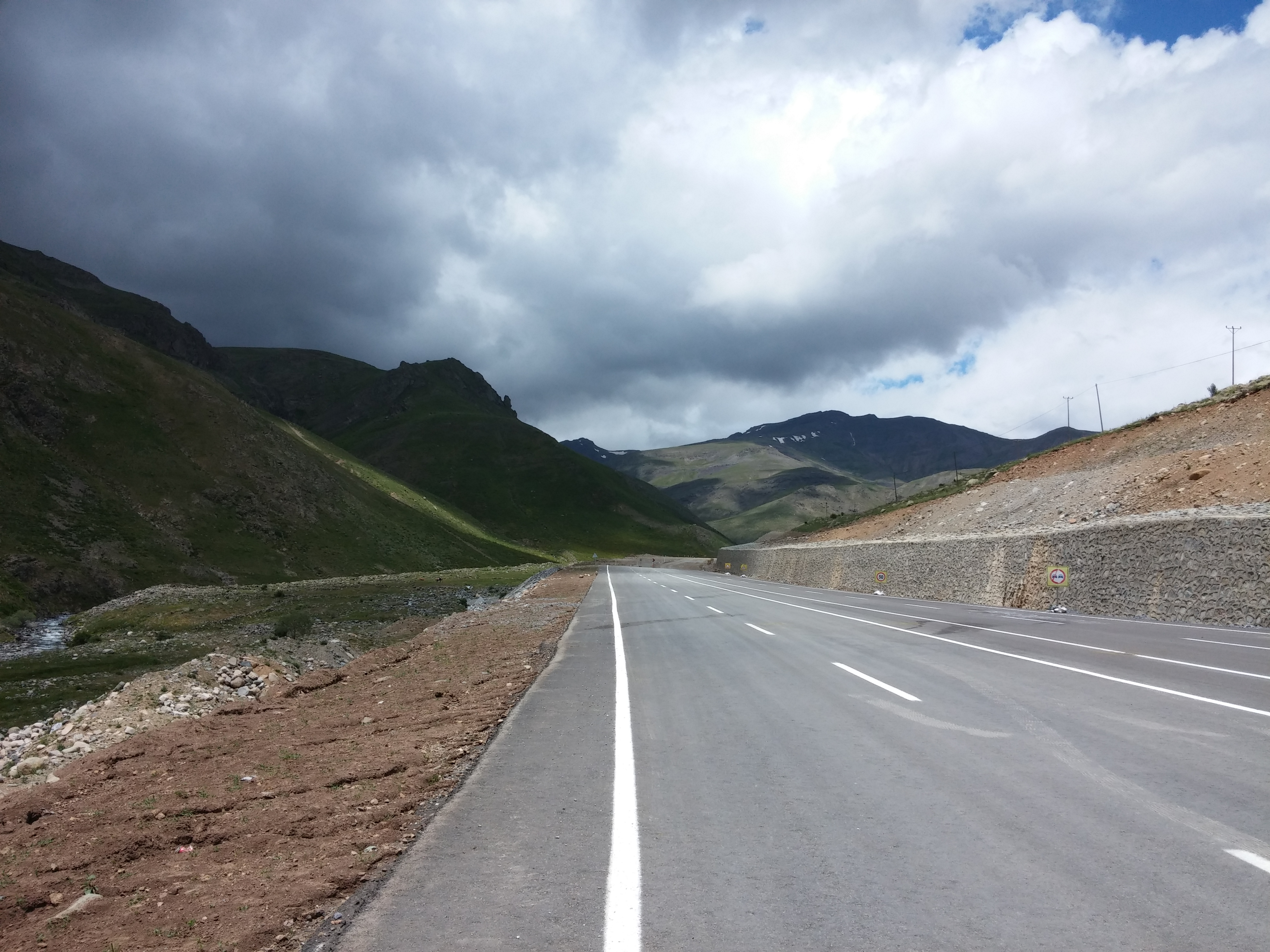 ovit yaylası